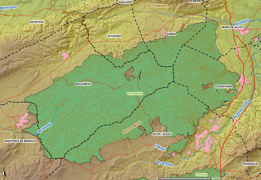 Mapa del Parque Natural Sierra Mariola